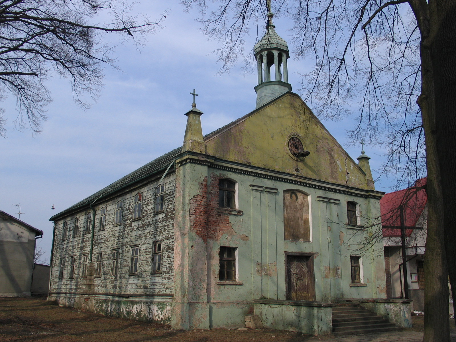 Nowosolna, drewniany XIX-wieczny kościół jest w rozbiórce